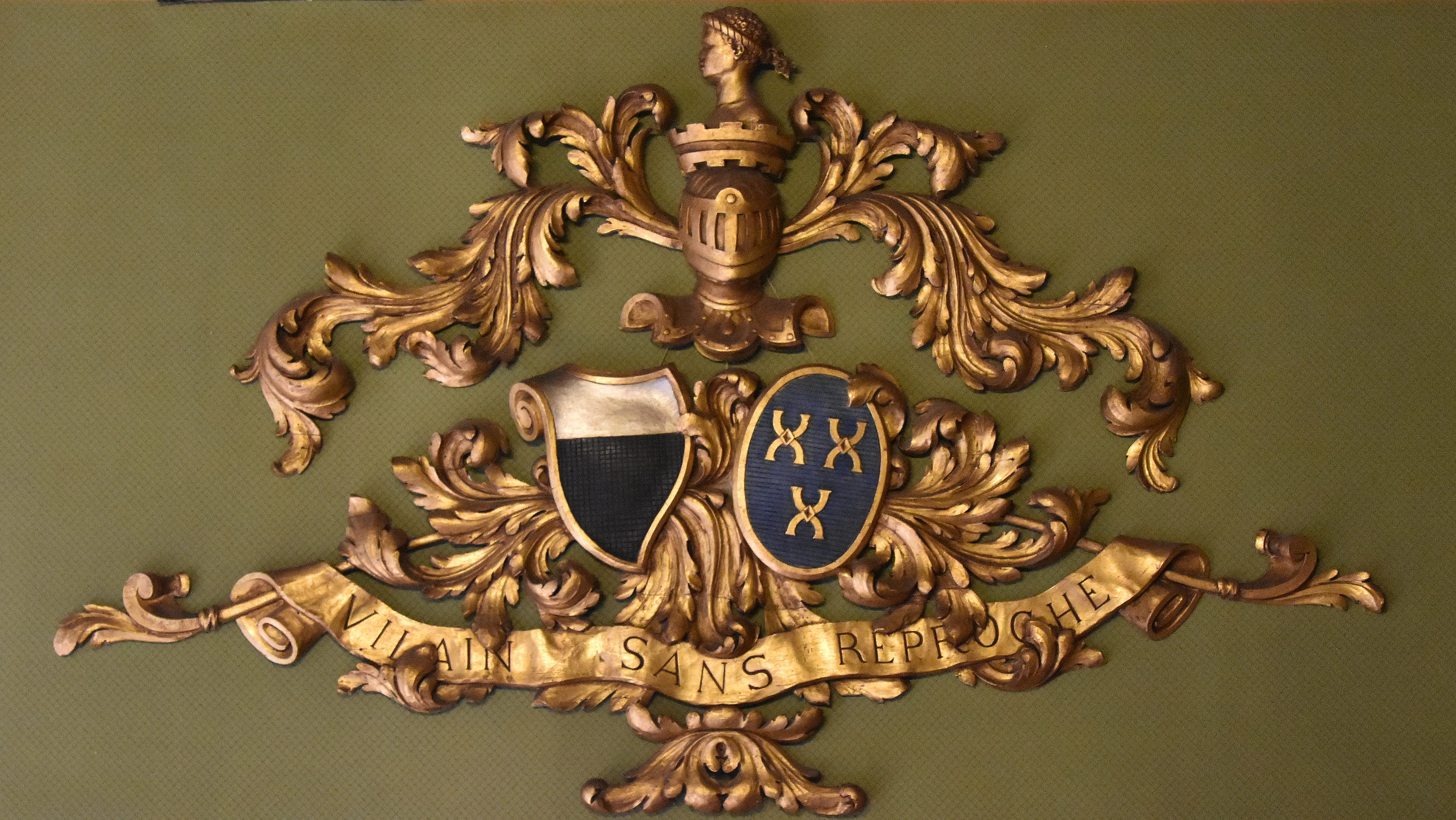 Vilain Sans Reproche (wapenspreuk) - Kasteel Wissekerke 21-08-2018 This photo of immovable heritage has been taken in the Flemish Region